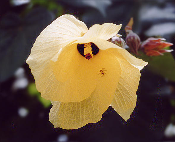 Hibiscus tiliaceus L. Imagem cedida gentilmente pelo Sr. Marcos Capelini, do site em português-inglês